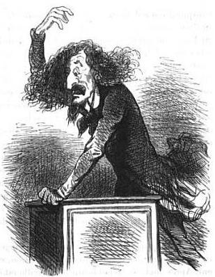 Caricature de Charles Lagrange (1804-1857) par Cham.